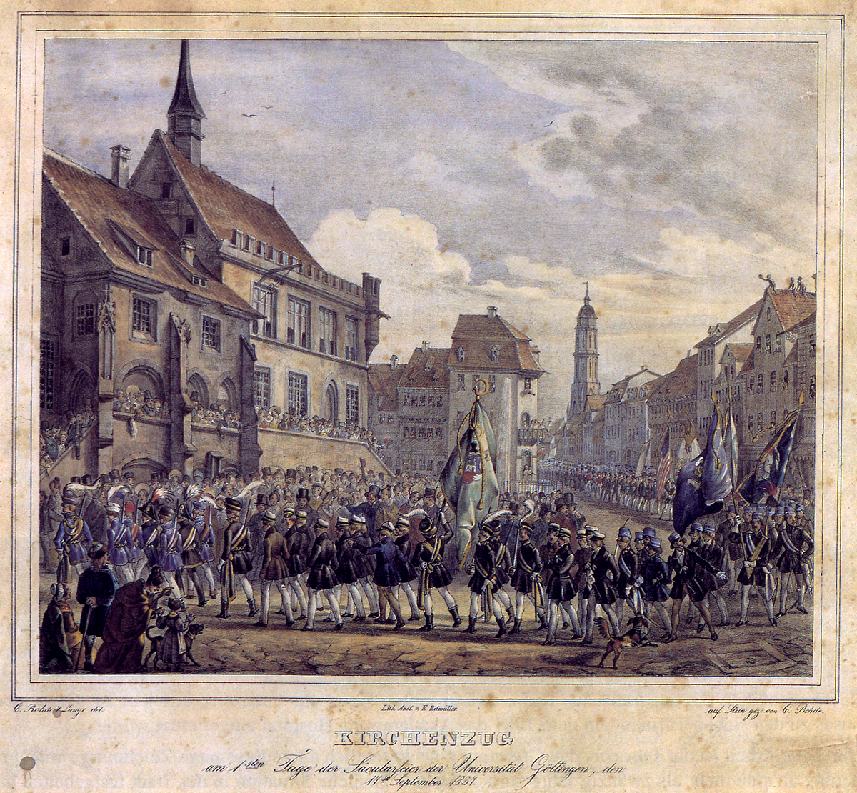 Die Studenten der Göttinger Universität ziehen am 17. September 1837 anläßlich des Universitätsjubiläums nach ihren Verbindungen geordnet zum Gottesdienst am Rathaus vorüber.